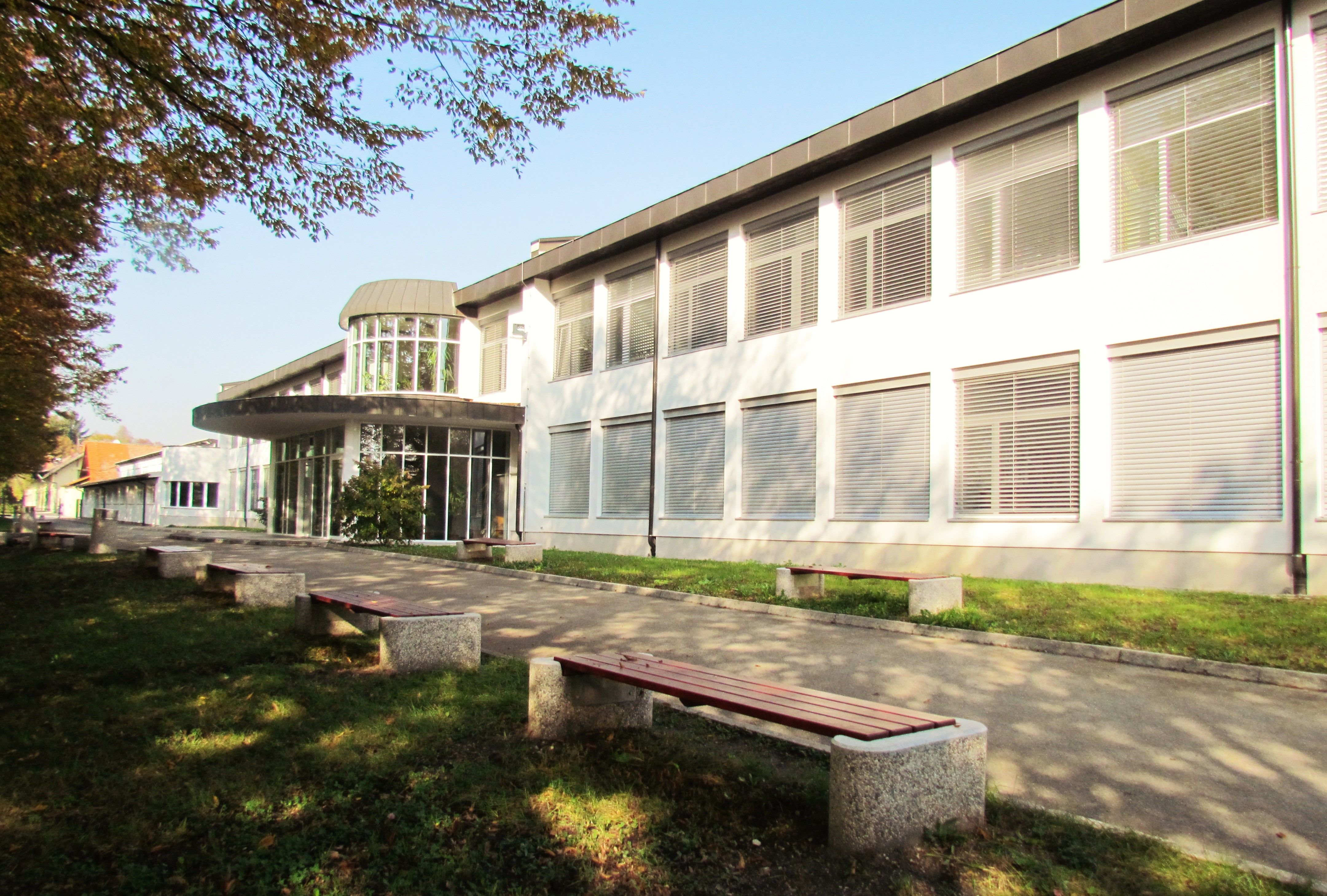 BIC Ljubljana, Cesta v Mestni log 47